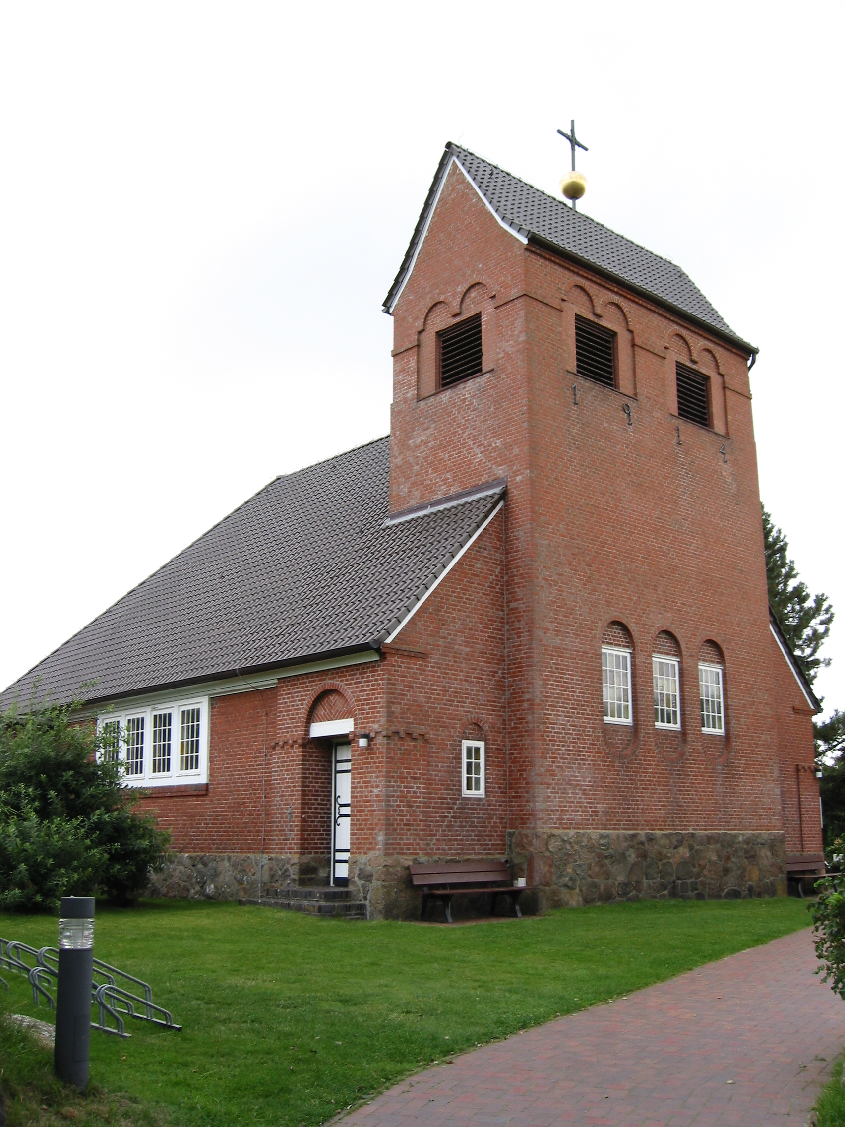 Wenningstedt church